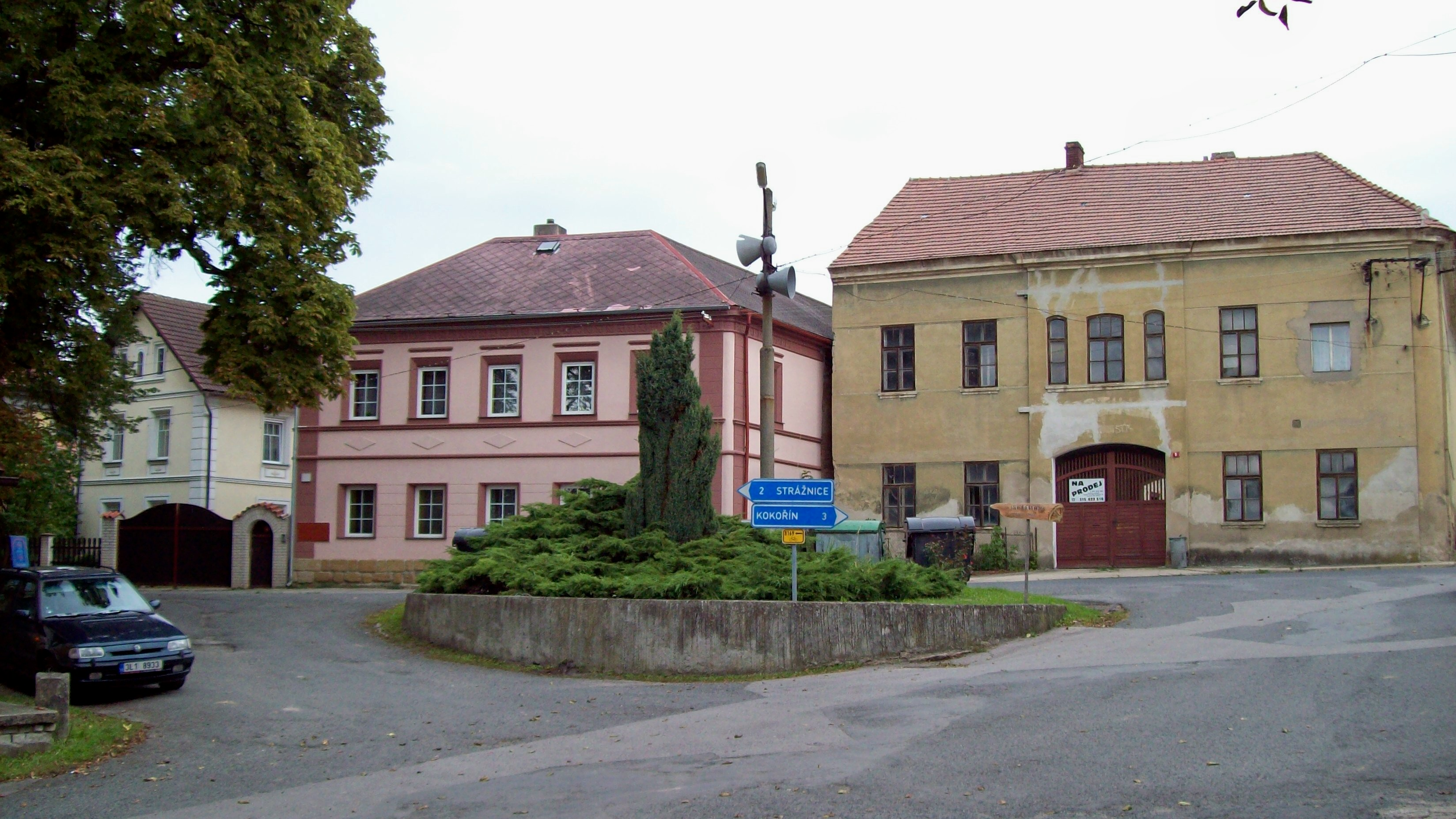 Náves ve Vysoké, okres Mělník.